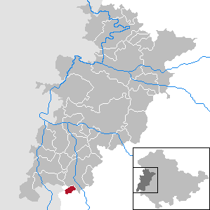 Empfertshausen in Thuringia - Wartburgkreis